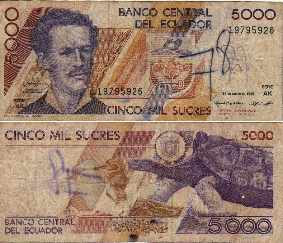 Ecuadorian 5000 Sucres bill